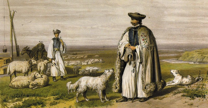 Gábor Prónay: Vázlatok Magyarhon népéletéből. Pest, 1855